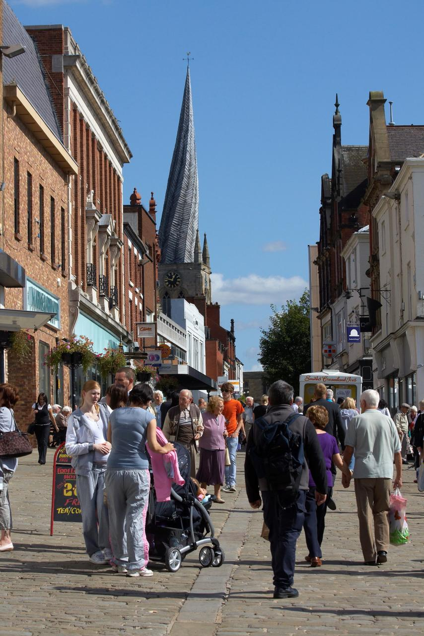 Burlington Street , Chesterfield